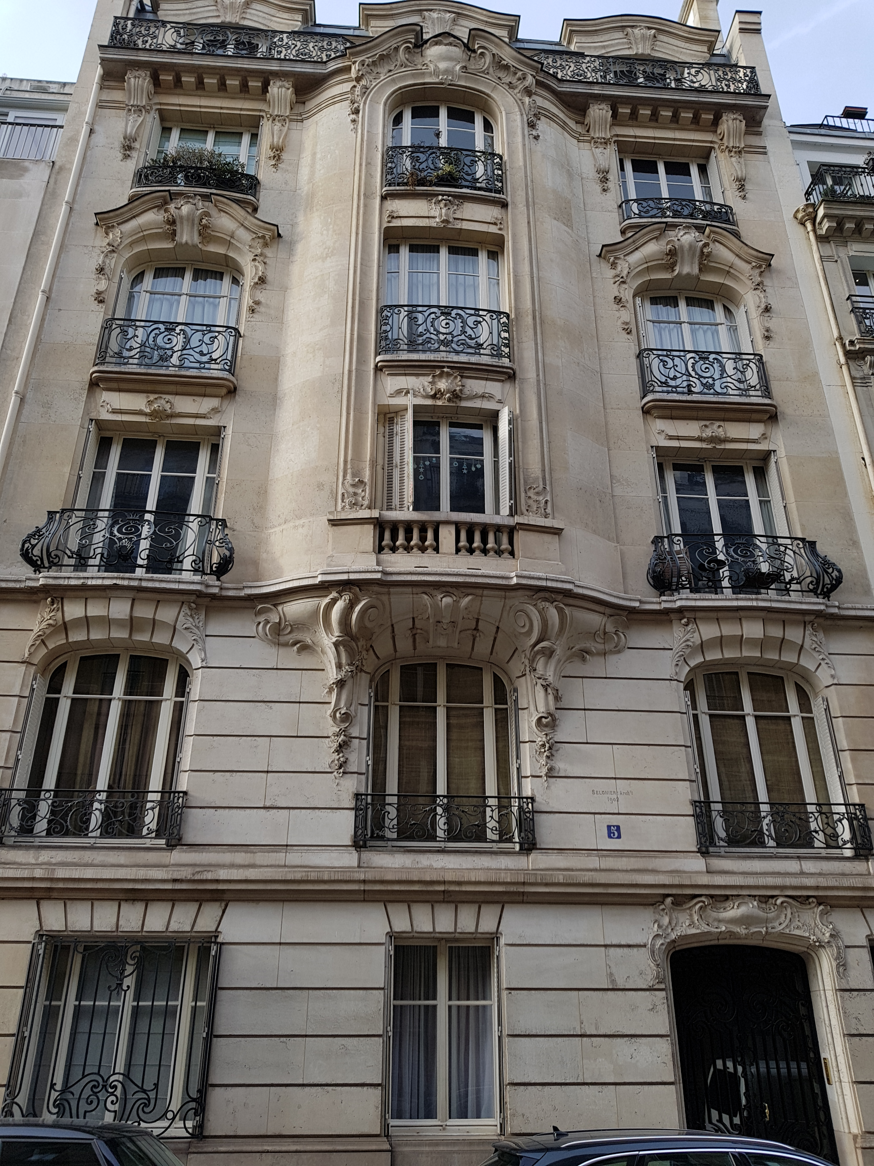 Immeuble de 1902, 5 rue de Belloy, Paris 16e.